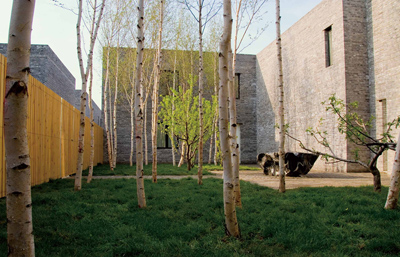 Pékin Fine Arts Garden